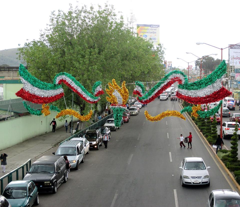 Boulevard Cuahutemoc